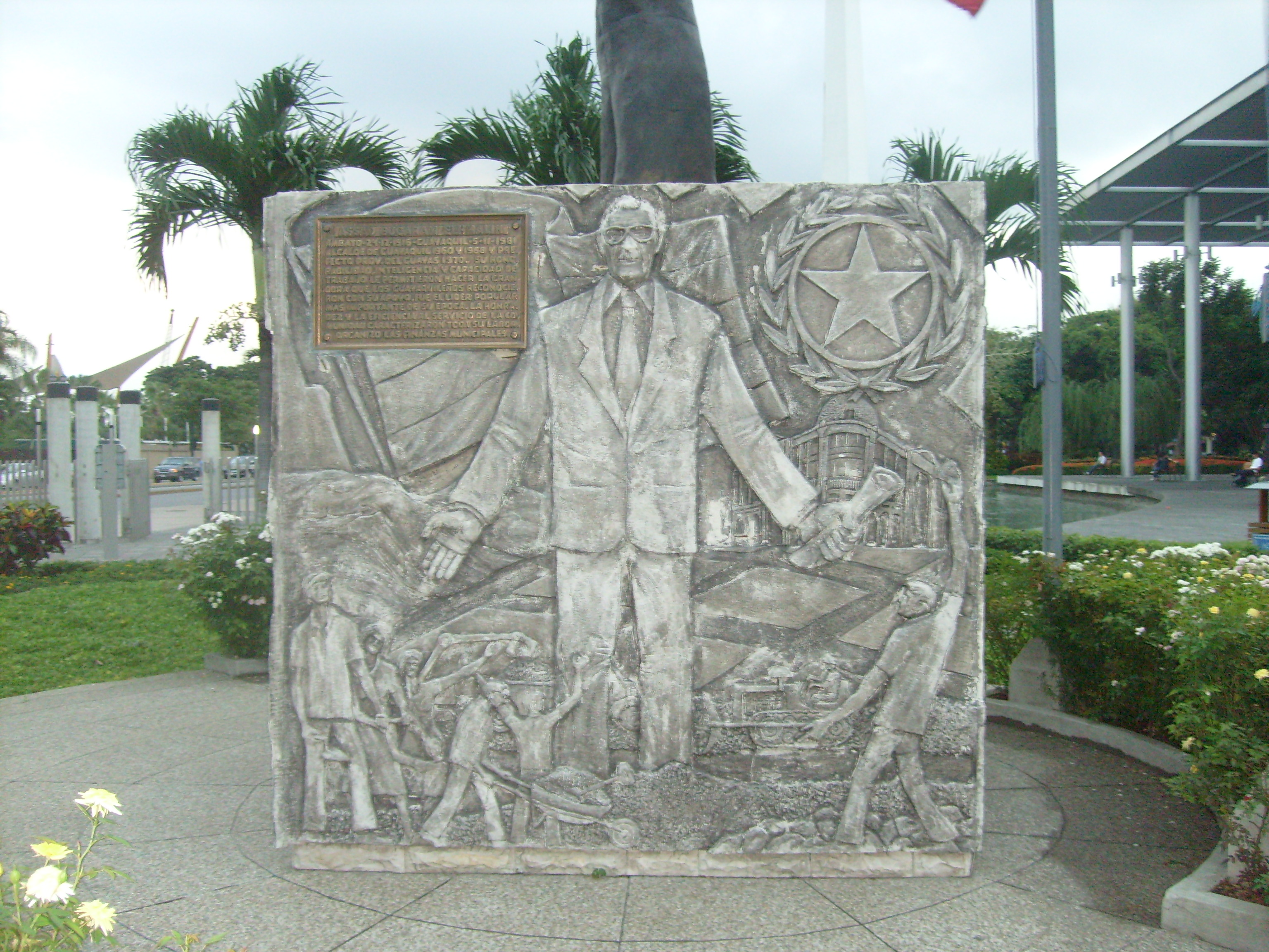 Baase lateral izquierda del monumento en memoria de Assad Bucaram, ubicado en el Malecón del Saldo de Guayaquil.